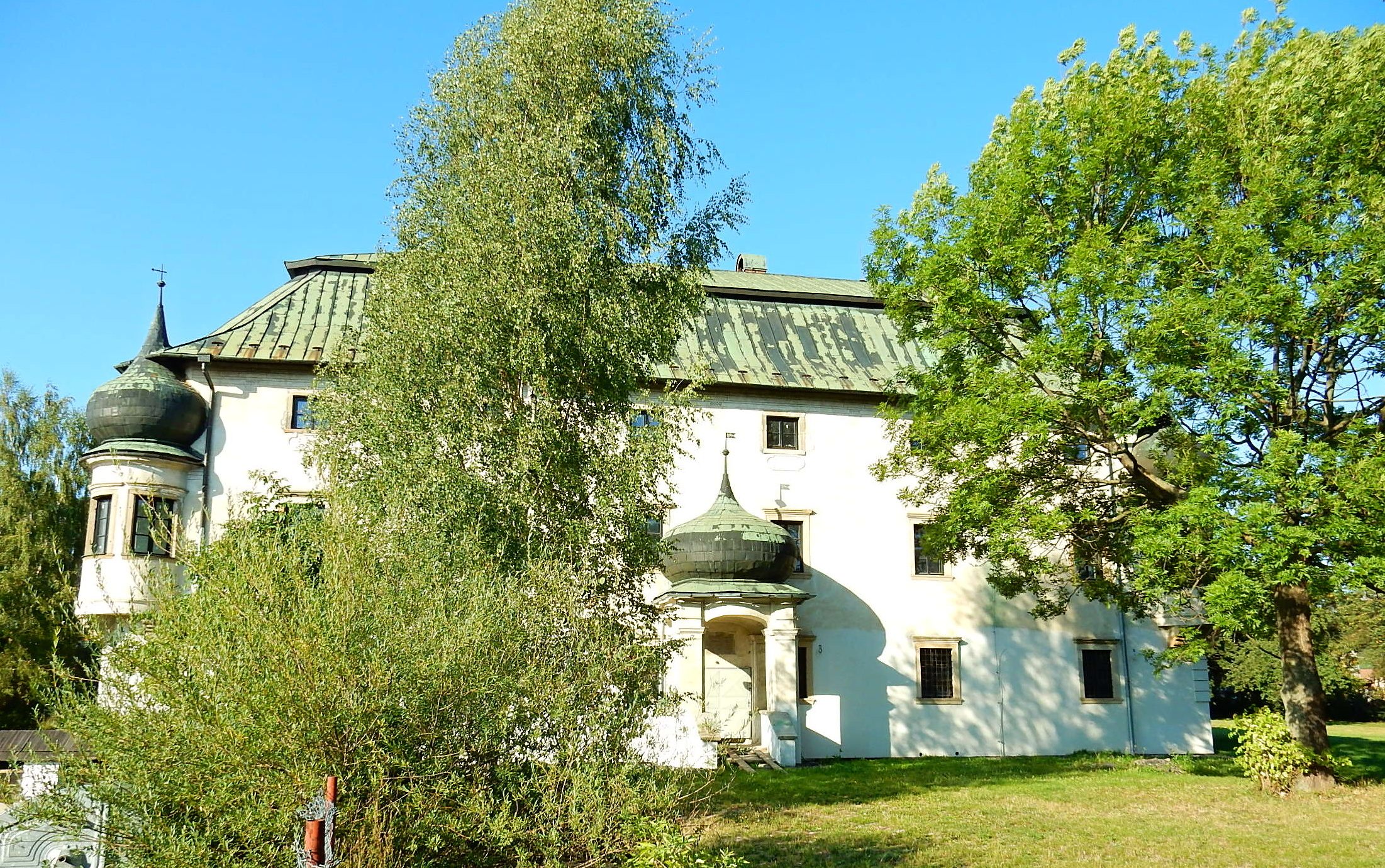 Kaštieľ